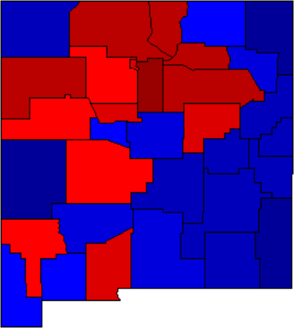 Carte des résultats des élection présidentielle américaine de 2016, par compté, au Nouveau-Mexique